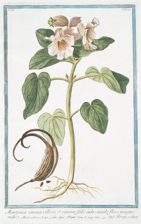 Ілюстрація Proboscidea louisianica